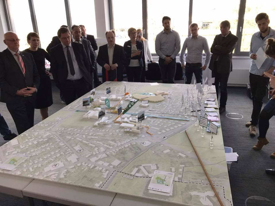 Aufnahme während des Massterplanprozesses